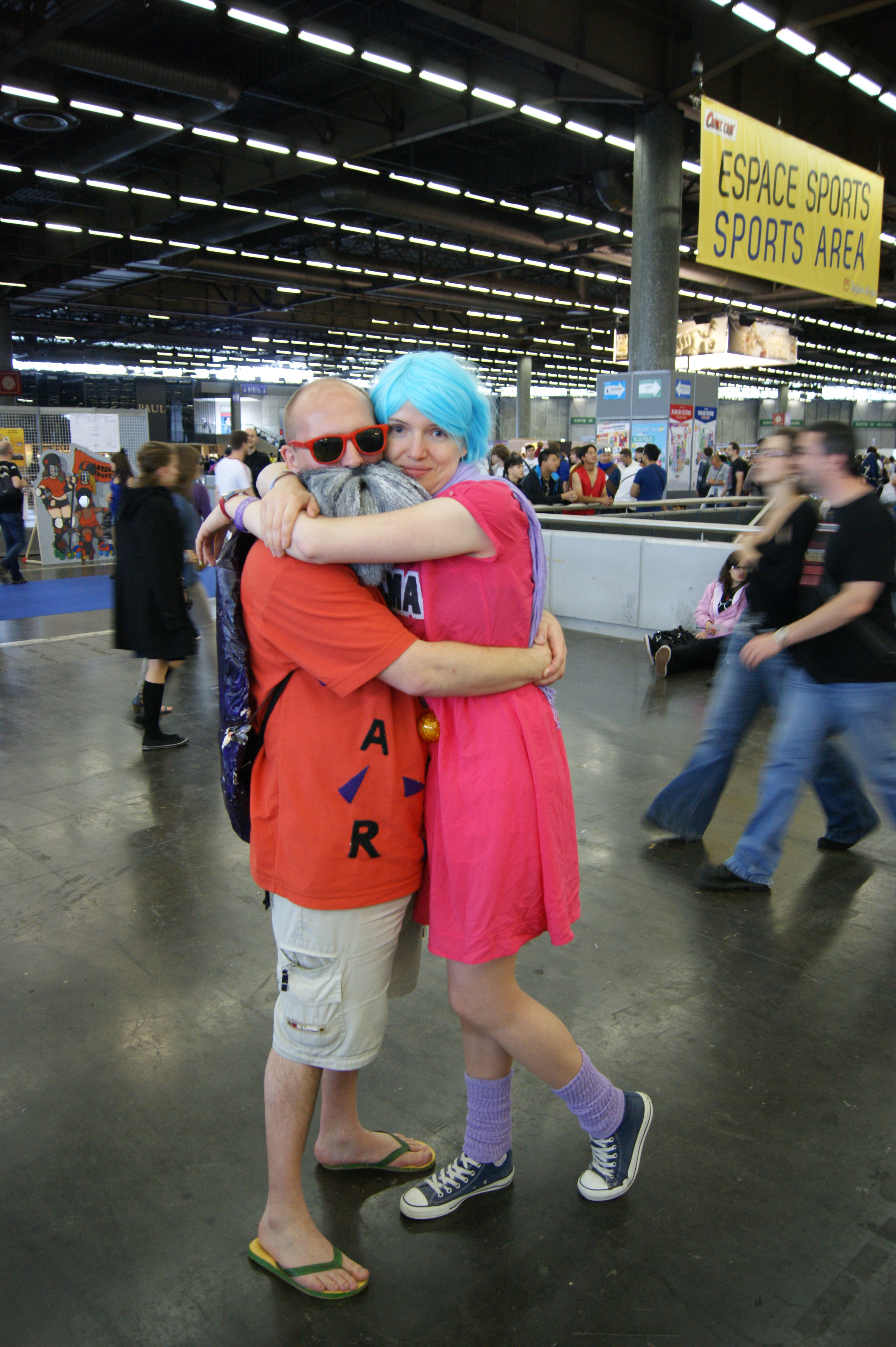 Cosplay de Kamé Sennin et Bulma (Dragon Ball Z) - Japan Expo 2012